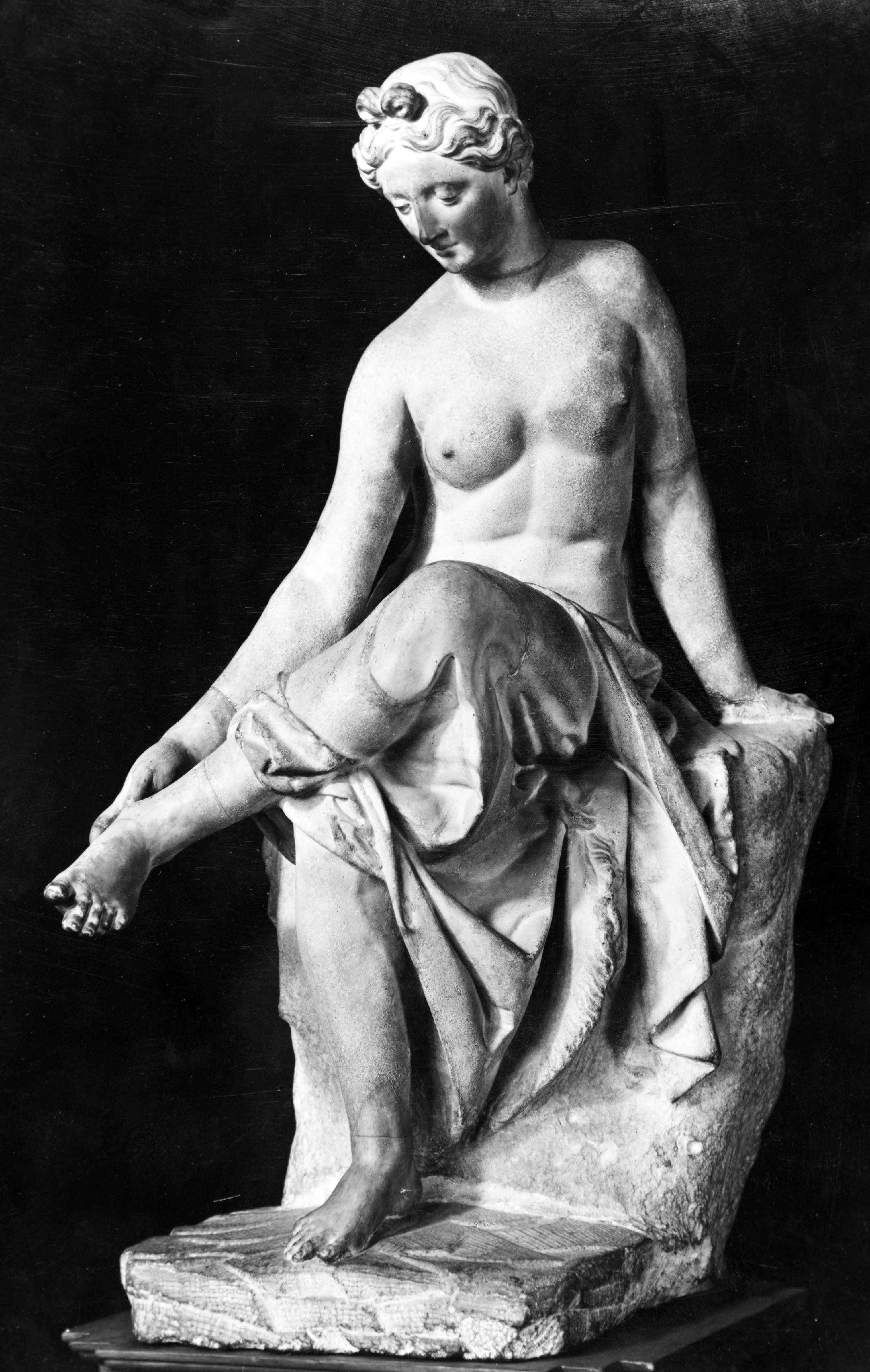 Ninfa seduta o anche Ninfa alla Spina